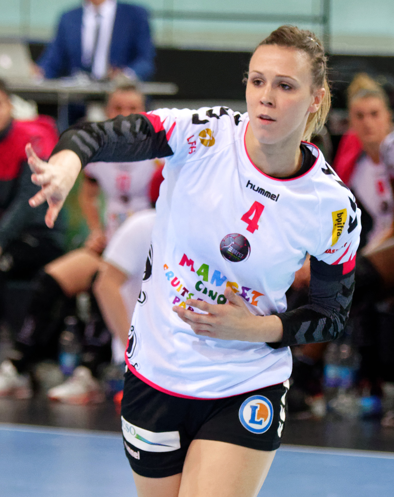 Rencontre de championnat entre Issy Paris et Brest. Au vélodrome de saint Quentin en Yvelines, le 25 mars 2017.